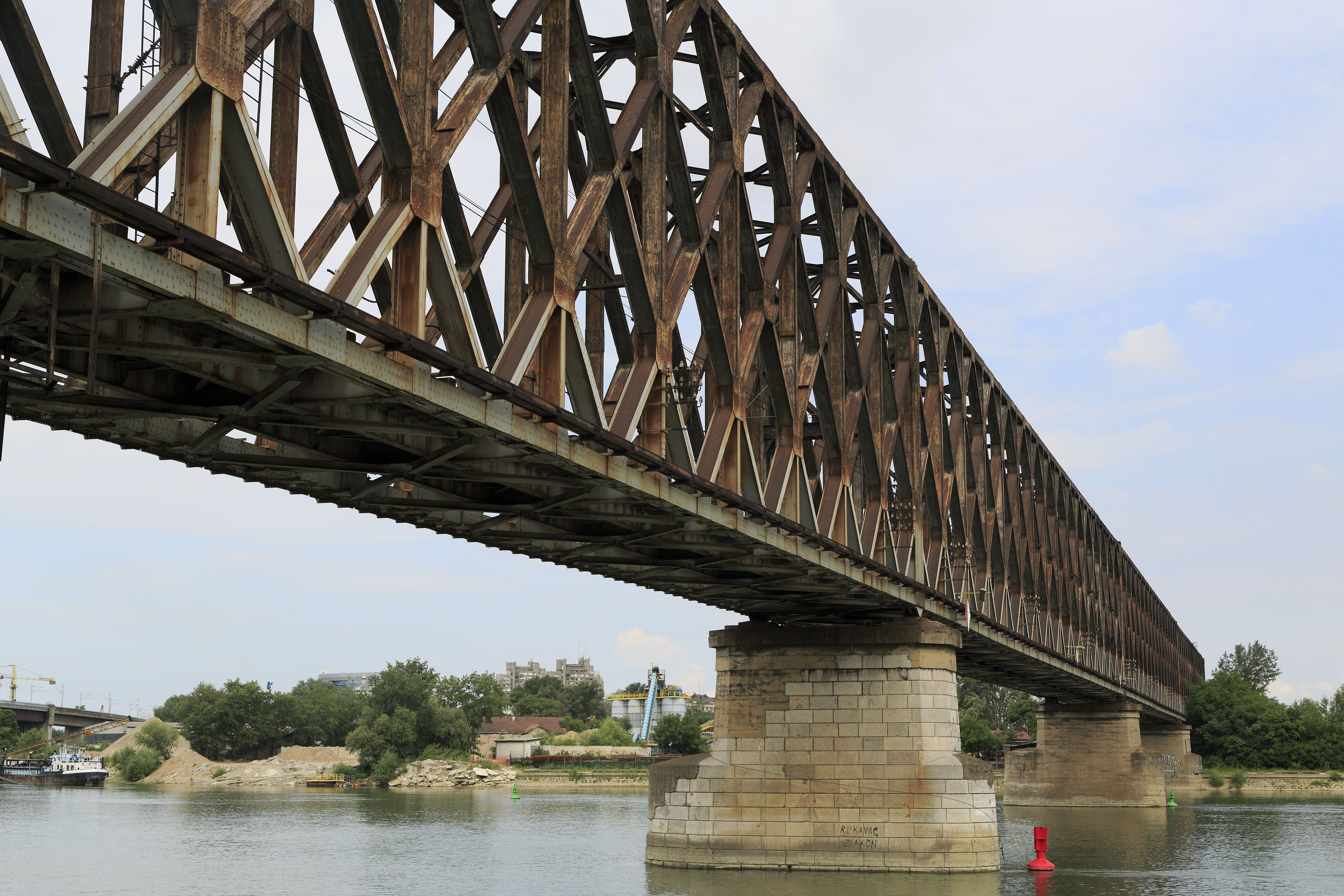 Verbindung zwischen den Bahnhöfen Beograd und Novi Beograd, die Brücke ist schon seit mindestens 1990 nur noch mit 10km/h befahrbar. Richtung Nordwesten, die Strecke führte ursprünglich nach Zemun und wurde mit dem Bau der Bahnhöfe Novi Beograd und Beograd Centar vor 1990 an den Bahnhof Novi Beograd angeschwenkt.